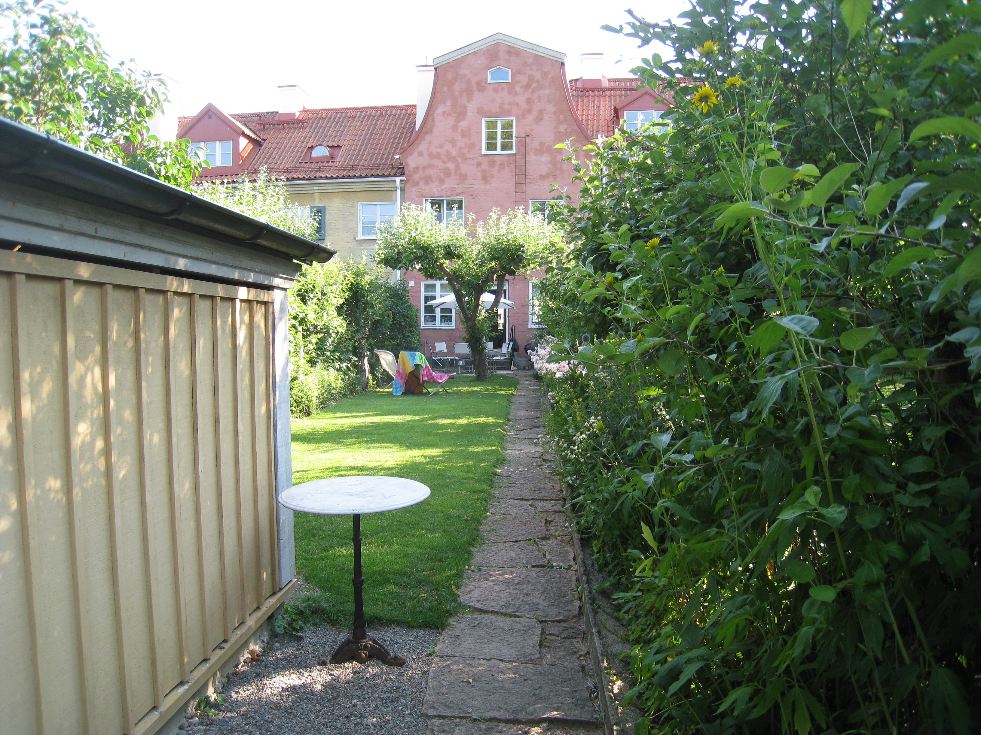 Radhusen i kvarteret Drivbänken i Äppelviken, Bromma.